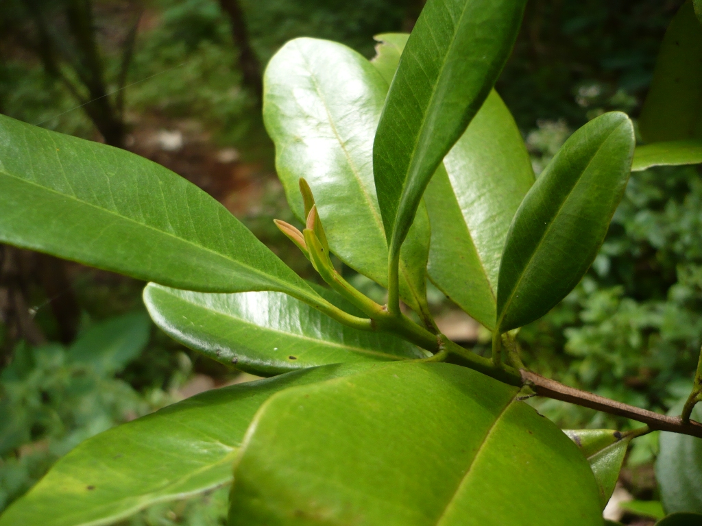 സർവസുഗന്ധിയുടെ ഇല